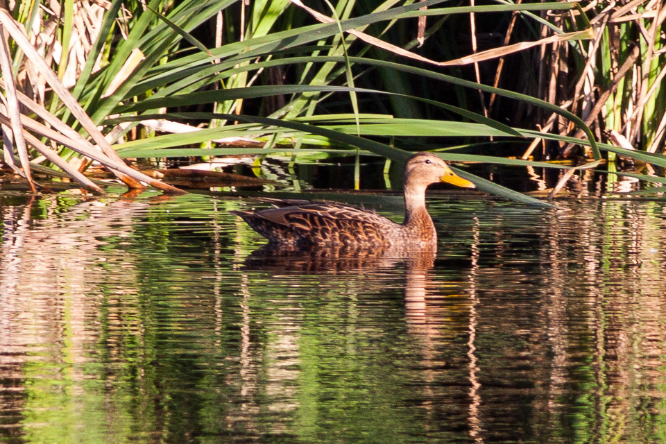 Mexican Duck Anas diazi, Ciudad Guzman Wetlands, Colima, Mexico